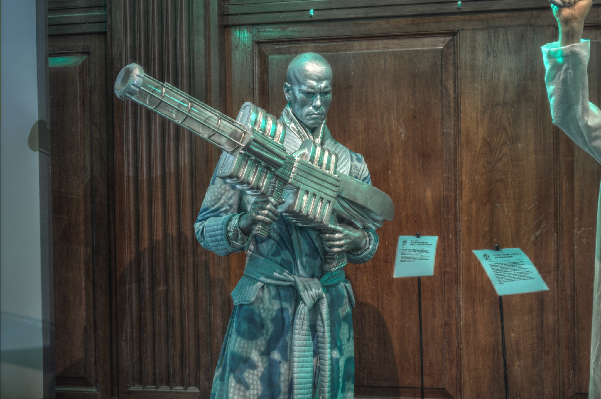 Camera: Nikon D5000 Luminance HDR, Mantiuk '06